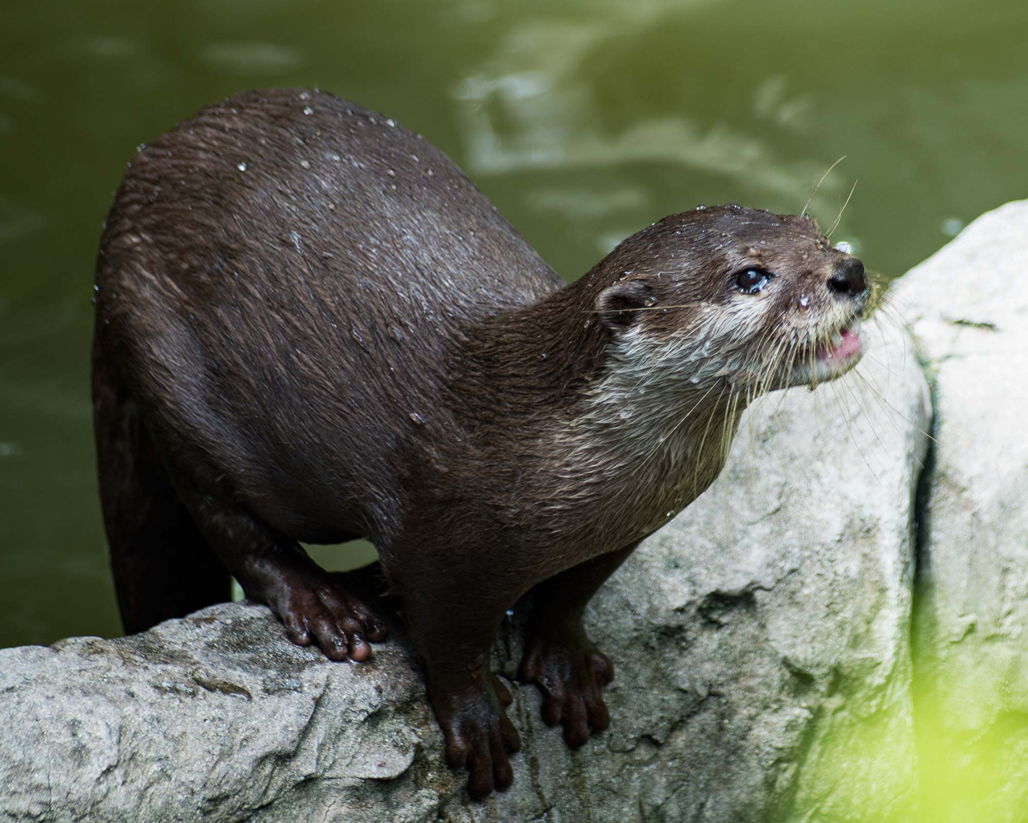 Суматранская выдра в зоопарке Као Кео